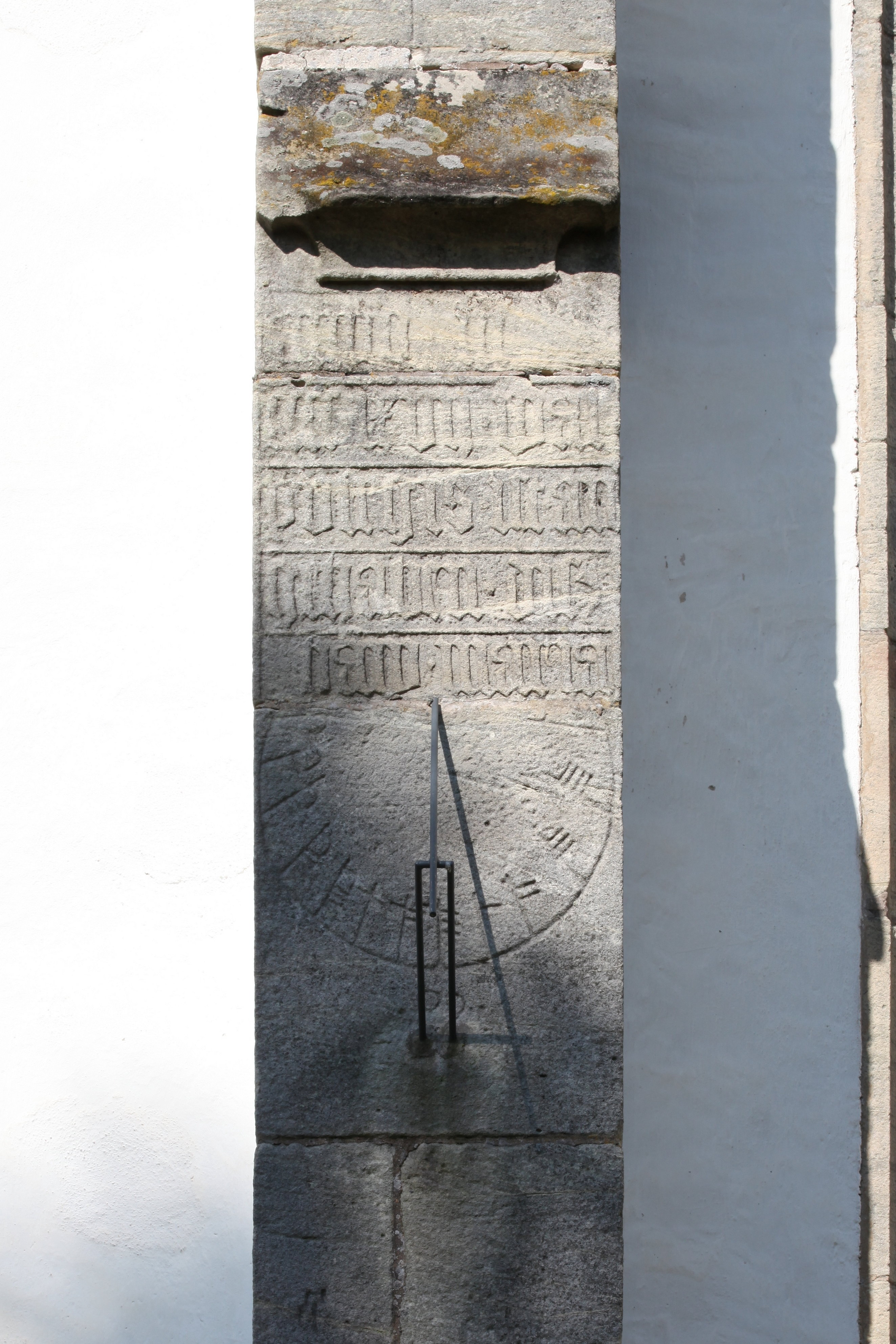 Sonnenuhr mit Holmzahlen auch Zimmermannszahlen genannt, St. Marien in Stelzen, OT von Sachsenbrunn